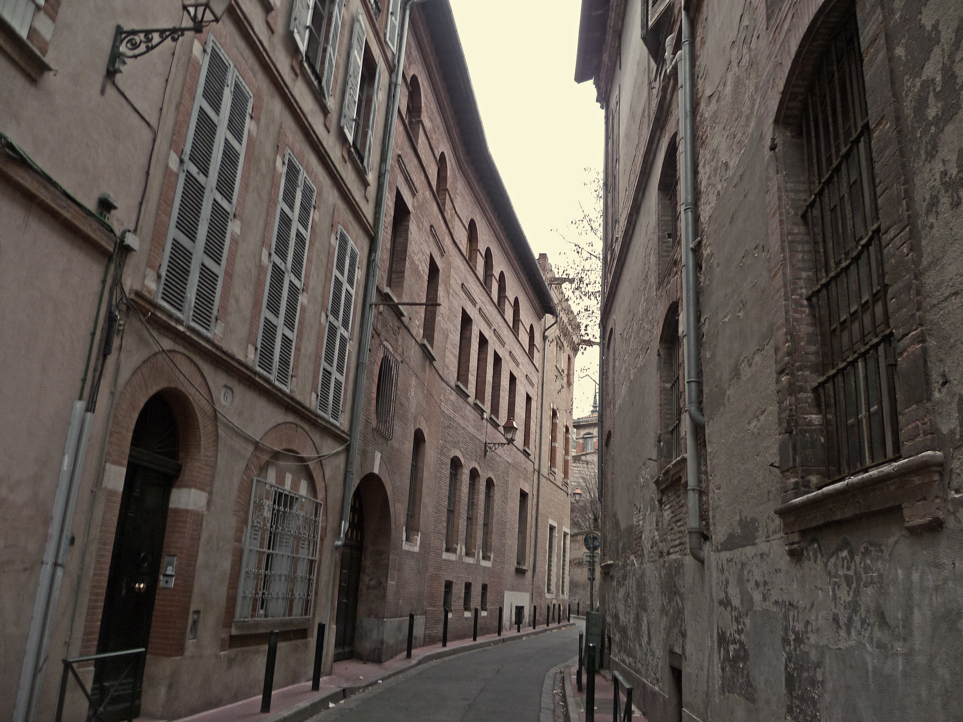 La rue d'Aussargues à Toulouse (Haute-Garonne, France).